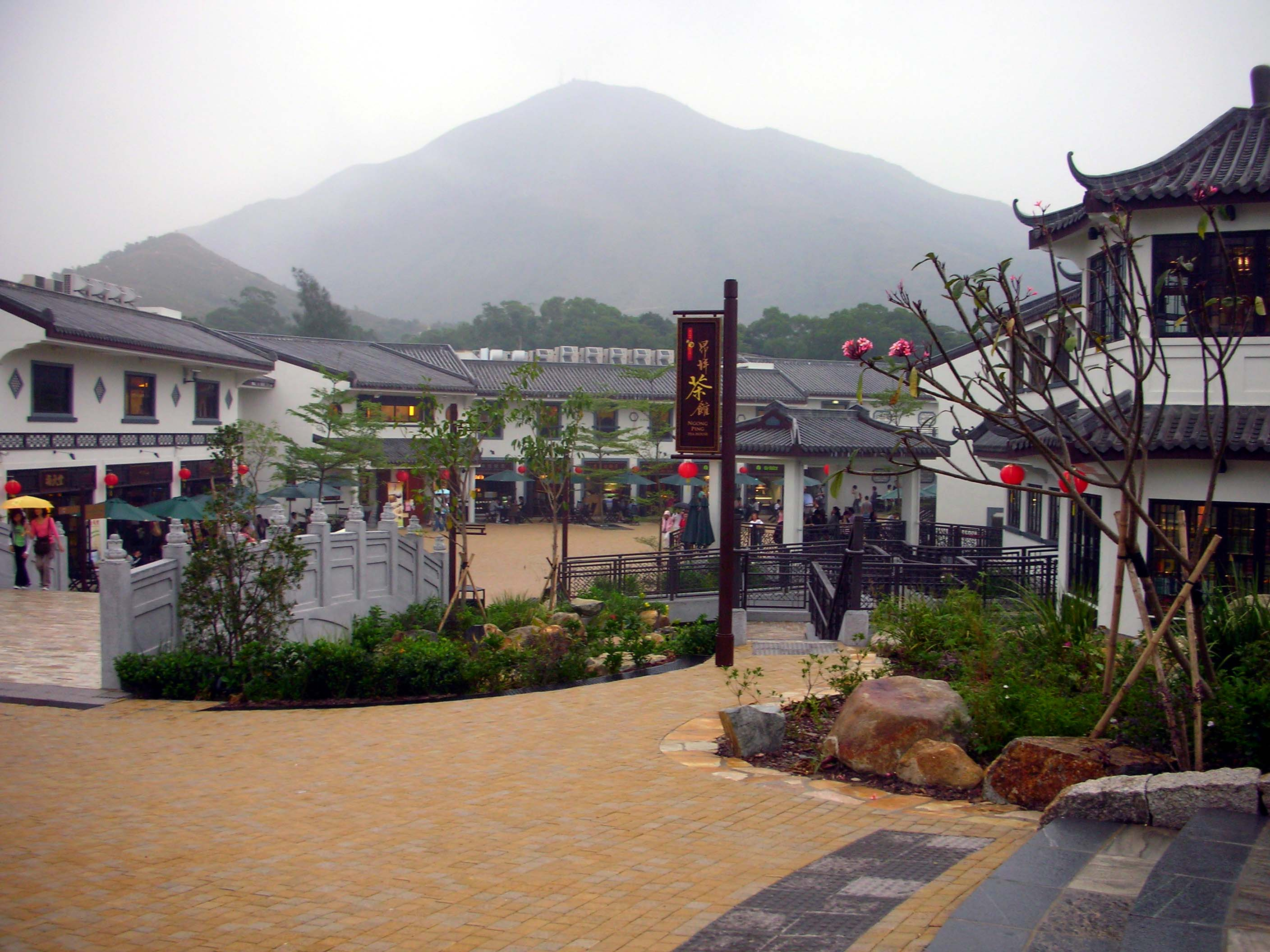 Ngong Ping Village, next to Ngong Ping 360 Hong Kong, Ngong Ping Terminal. Ngong Ping Tea House is in the right side of the Photo.